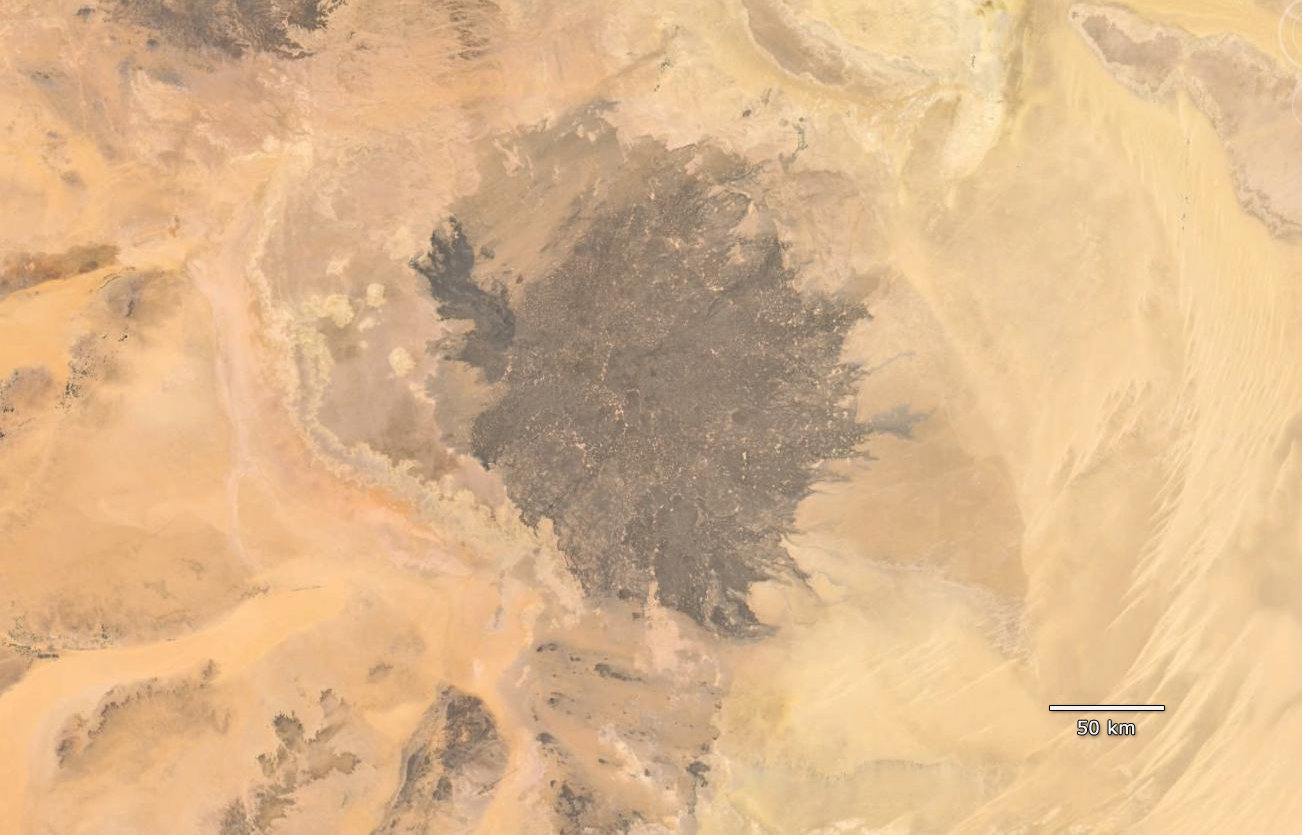 Champ volcanique de Haruj